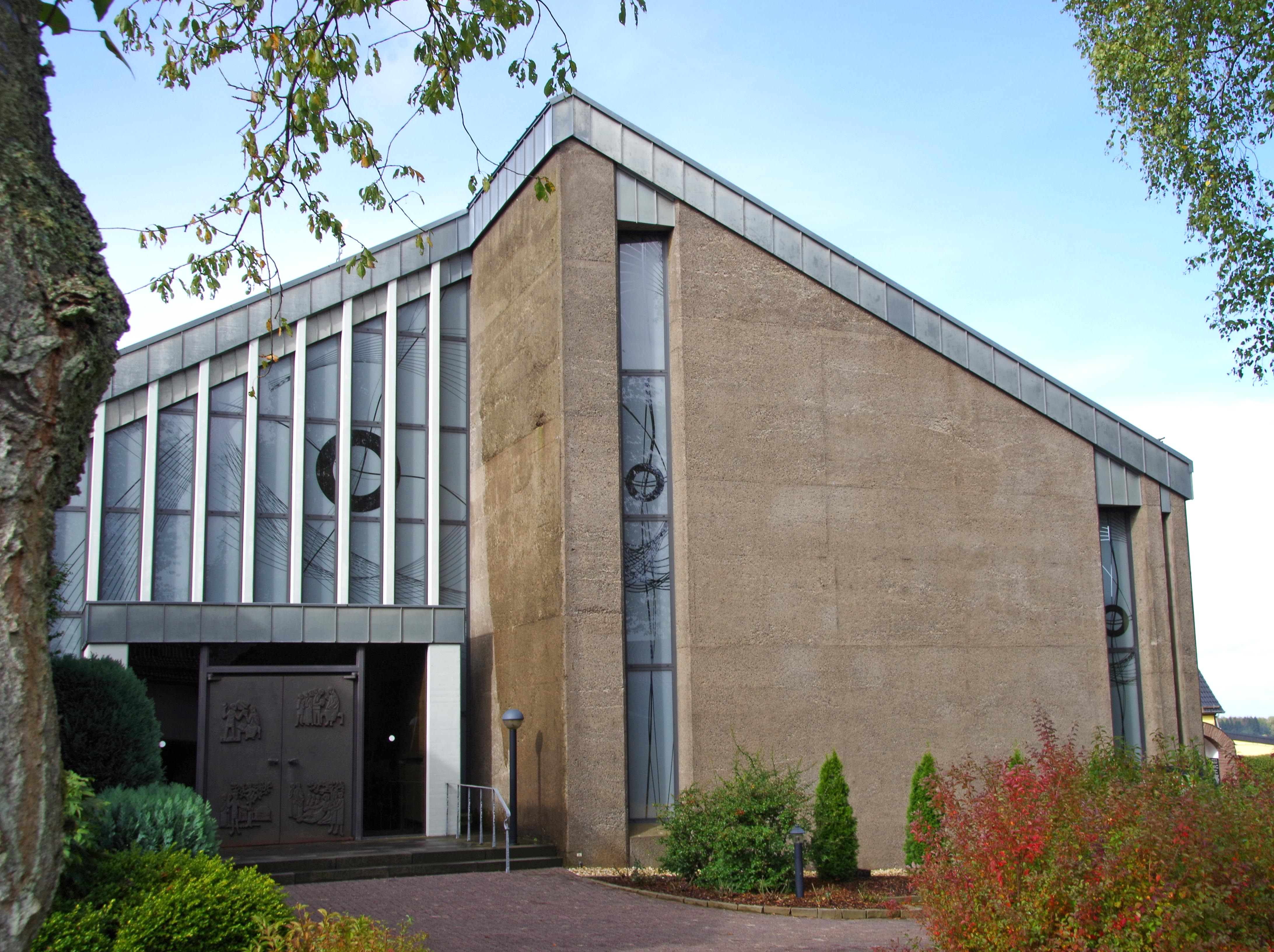 St. Katharina (Herhahn), Ostfassade mit Eingagsportal